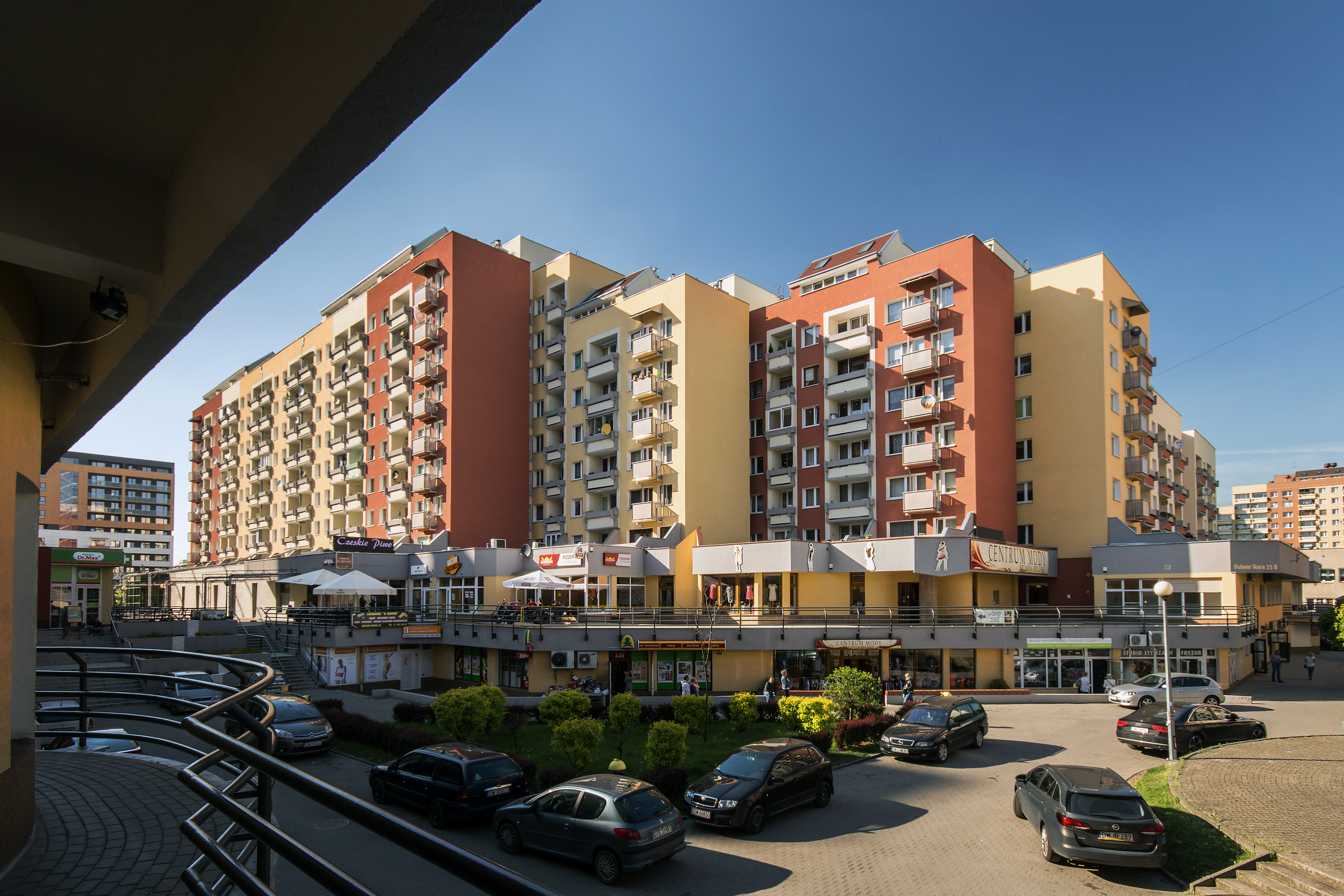 Bulwar Ikara, Osiedle Kosmonautów, Gądów Mały, Wrocław